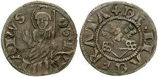 Italia, Macerata. Emissione Civica, sotto l'autorità Papale. 1447-1471. Quattrino di Biglione (0.66 g). S IVLIANVS. San Giuliano stante, stemma di Macerata in alto +DE MACERATA, Chiavi decussate. Italy, Macerata. Civic Issue, under Papal Authority. 1447-1471. Billon Quattrino (0.66 g). S IVLIANVS. St. Julian standing, Macerata arms above +DE MACERATA, crossed Papal keys. Biaggi 1101 see: Italian medieval coins